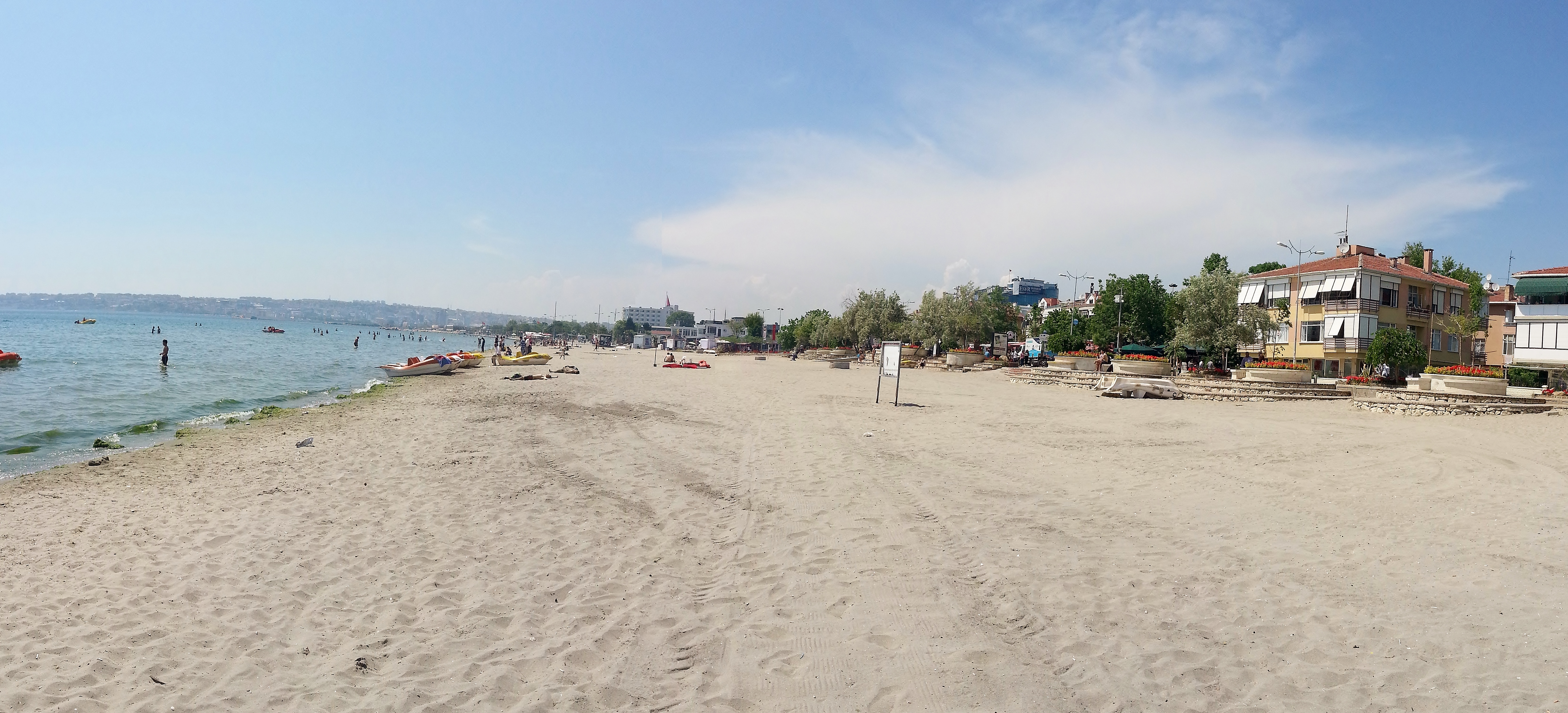 Büyükçekmece Sahili Panoraması, Mayıs 2014